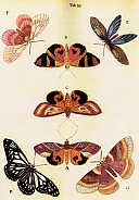 eine Seite aus Hermann Joseph Friedrich Beuths handschriftlichem Schmetterlingsbuch von 1790